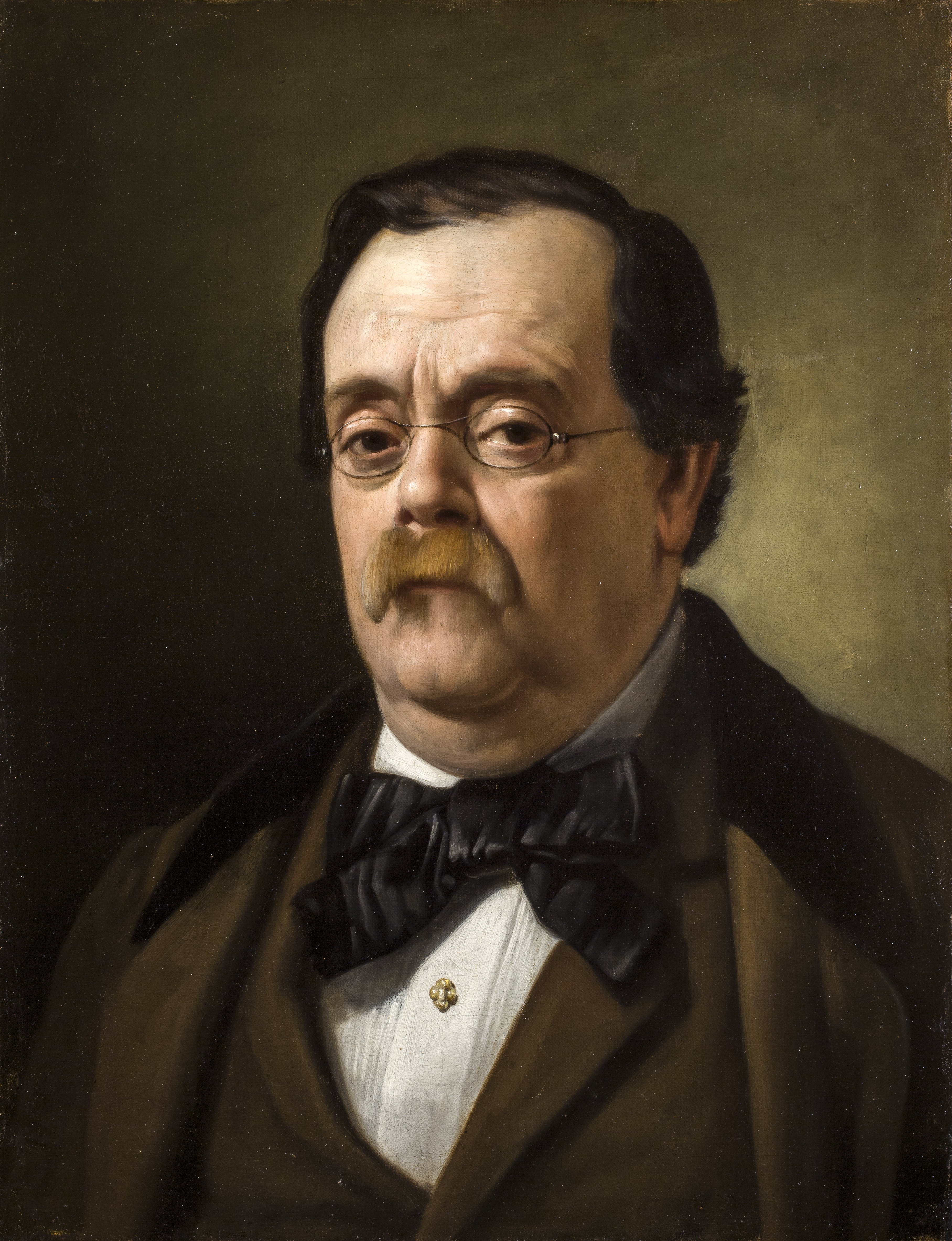 Autorretrato del pintor español Antonio Cabral Bejarano (1798-1861)